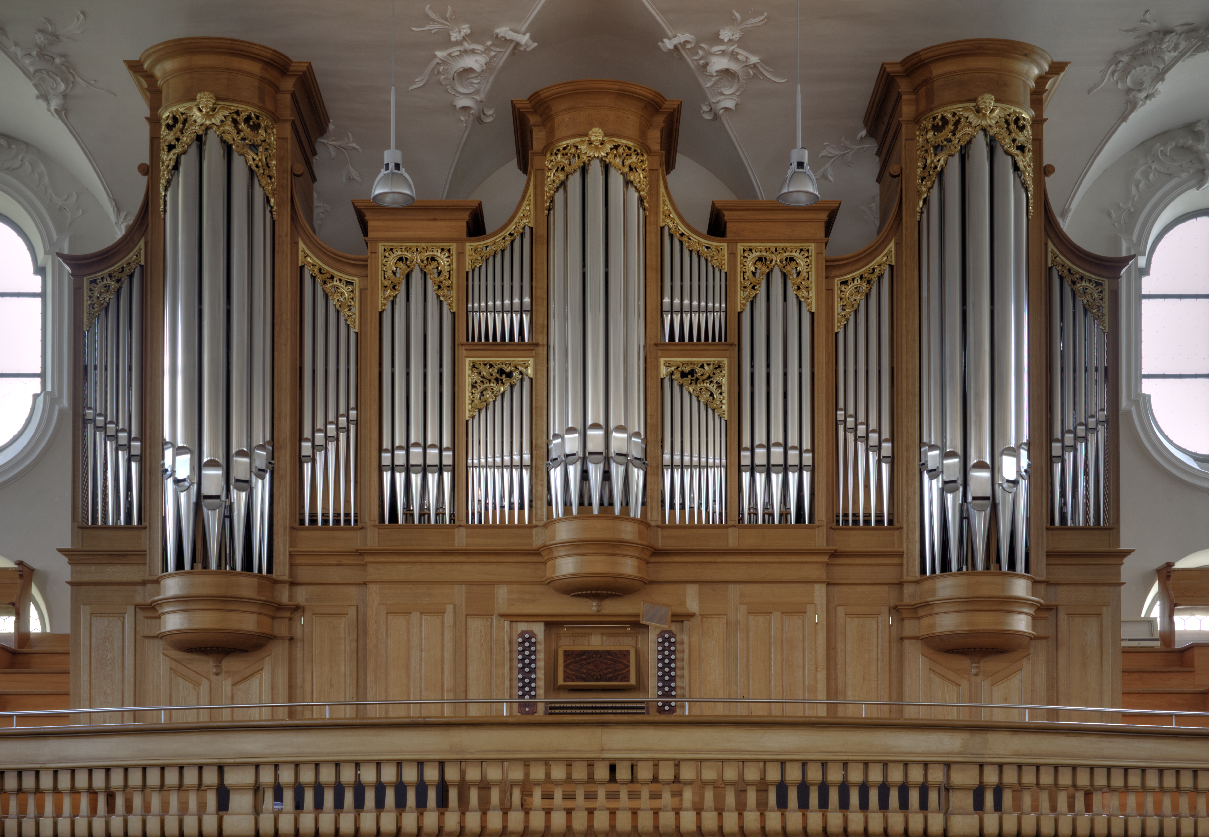 Orgel der reformierten Kirche Wädenswil, Frontalansicht